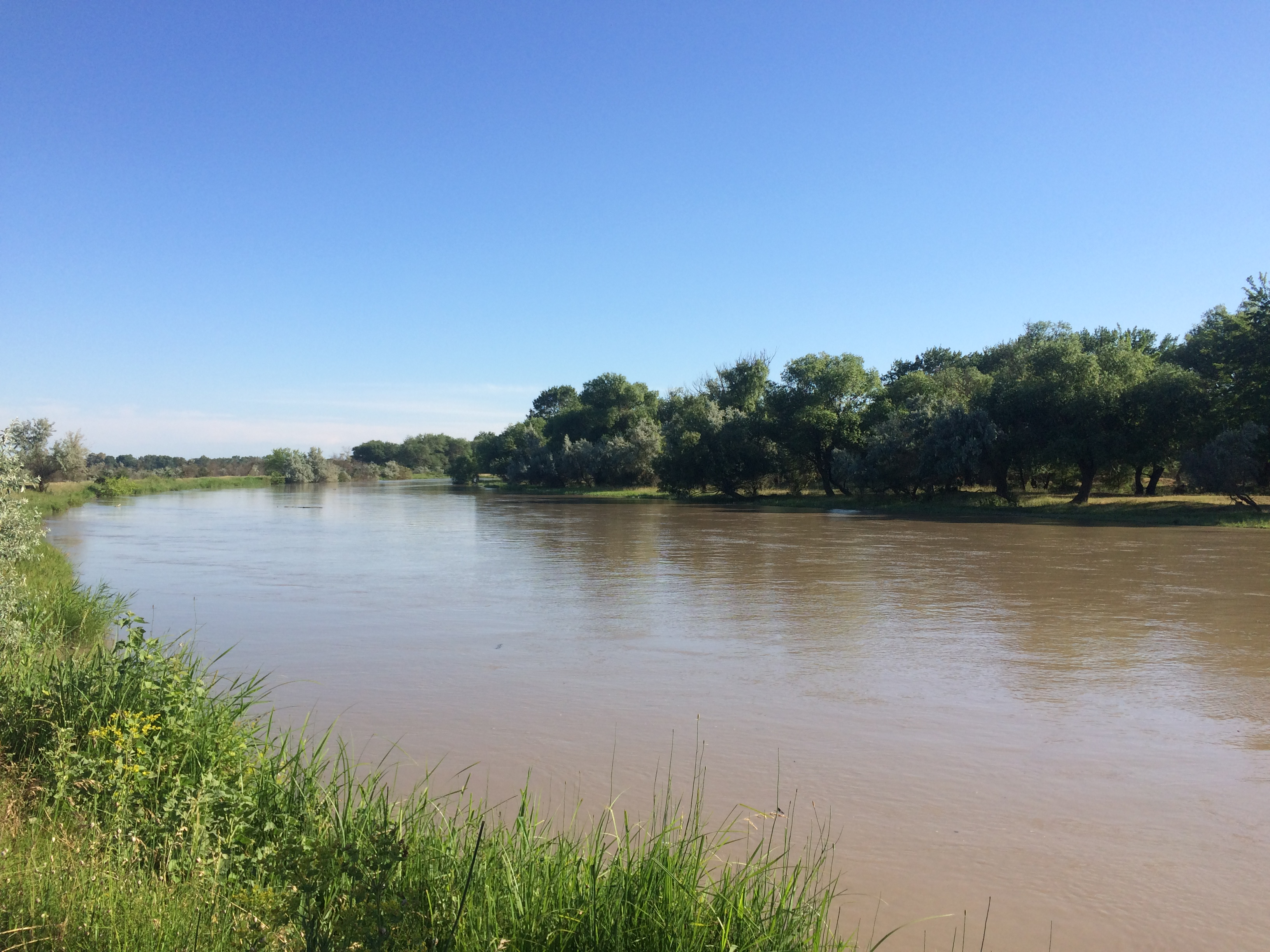 река Таловка в районе села Красный Восход